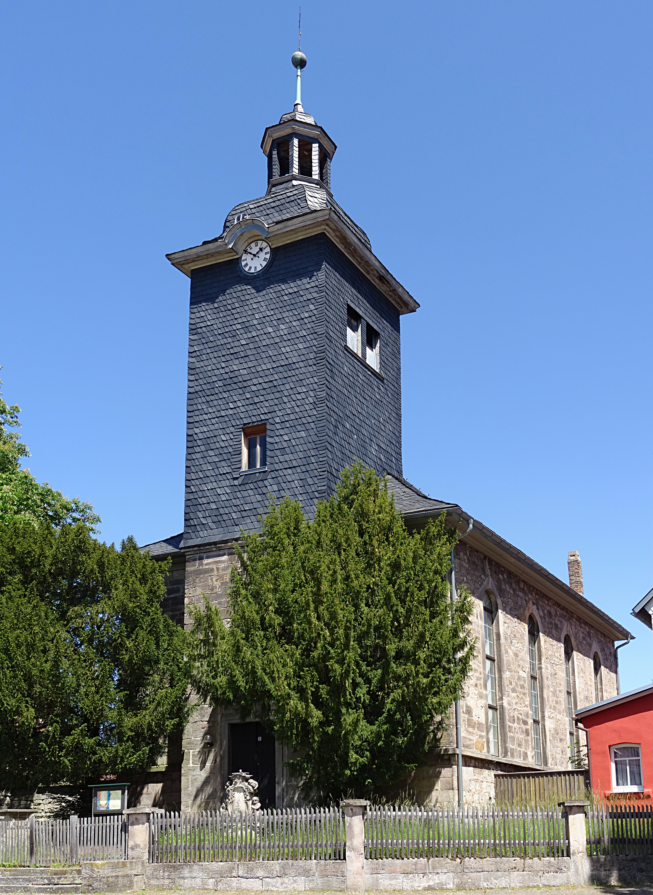 Die Dorfkirche Neusiß wurde von Clemens Wenzeslaus Coudray im klassizistischen Baustil entworfen und 1842 eingeweiht.